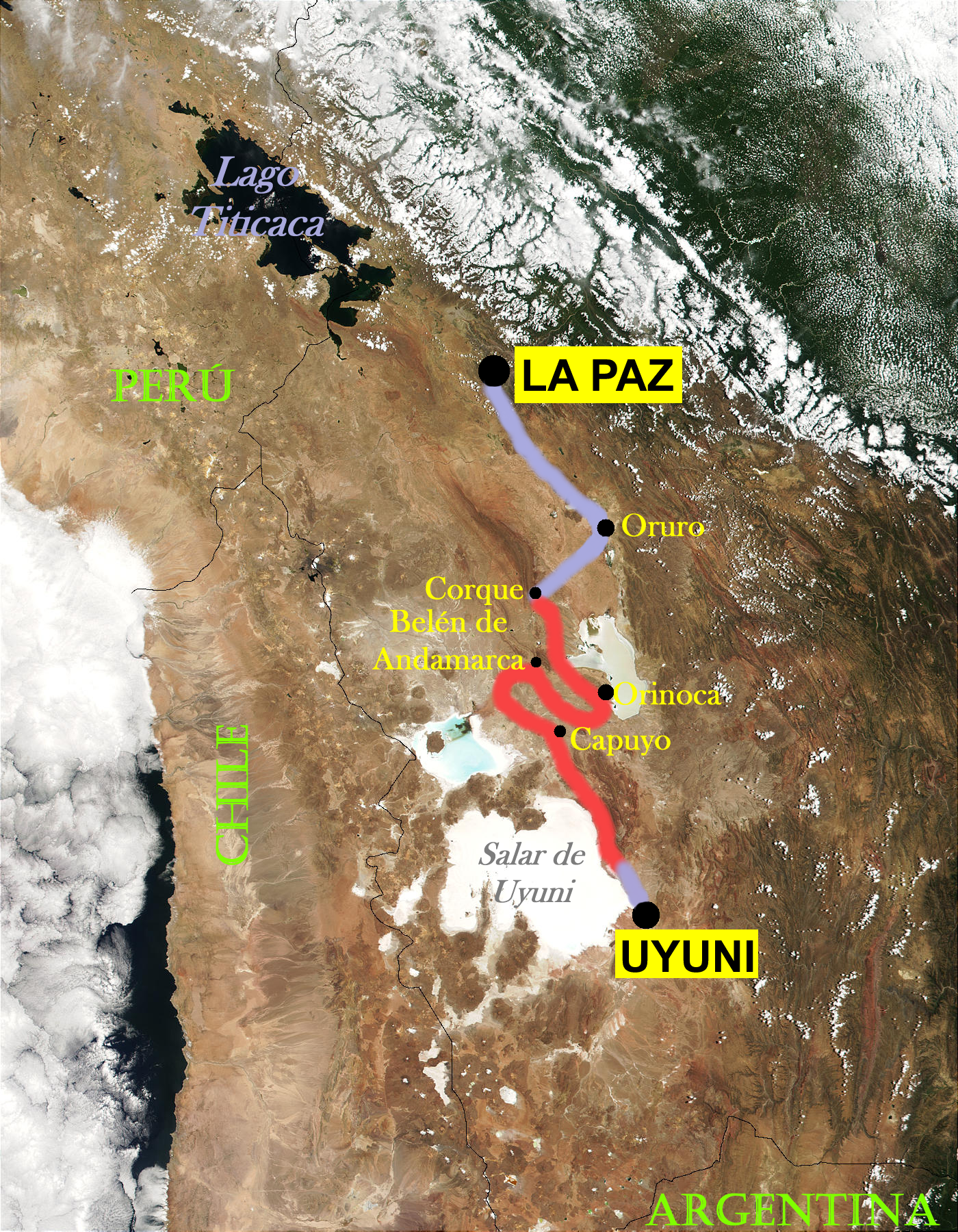 Rally Dakar 2018. Mapa de la etapa 7 (La Paz-Uyuni). Bolivia. Foto satelital.